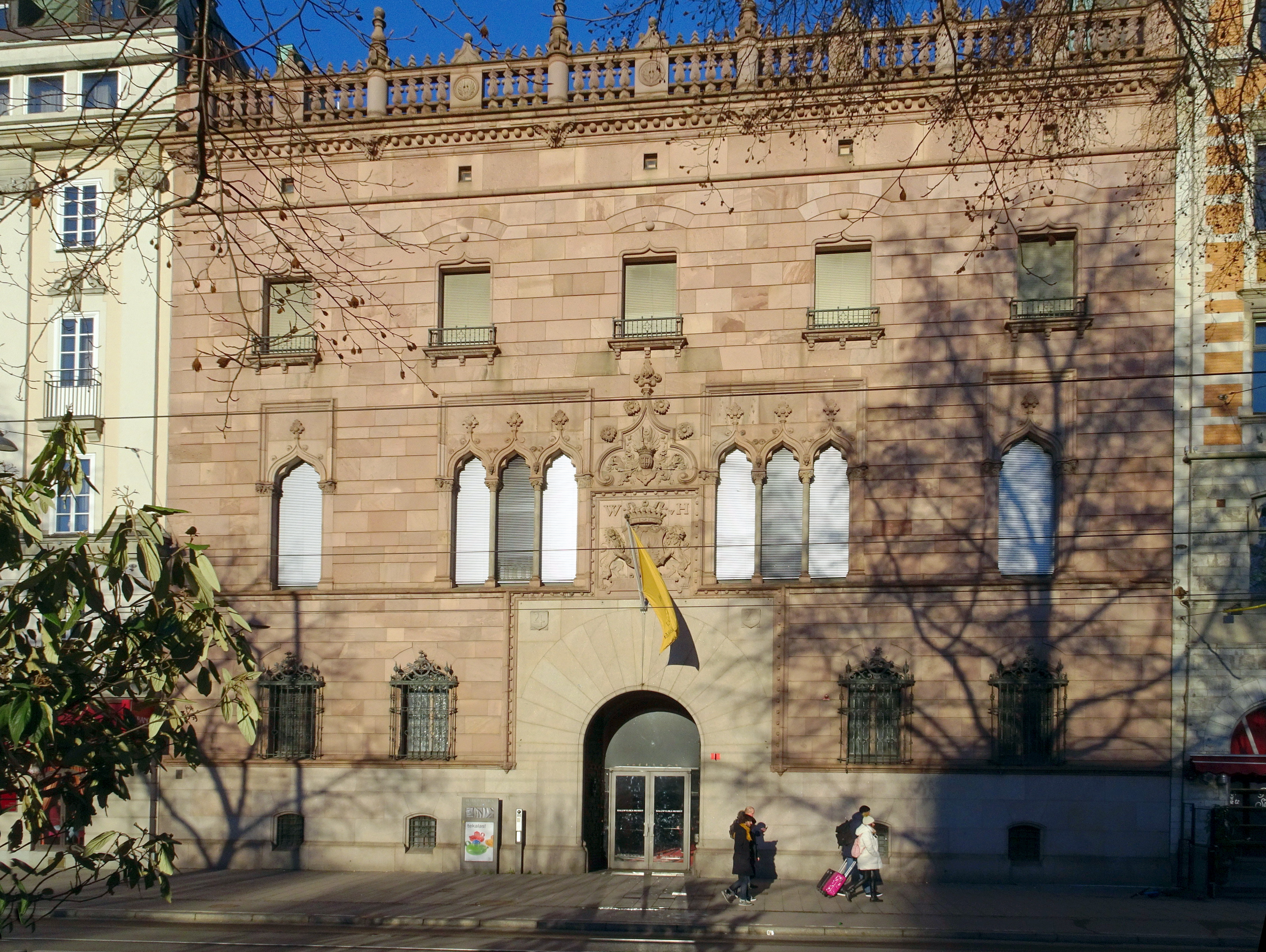 Hallwylska palatset fasad mot Hamngatan